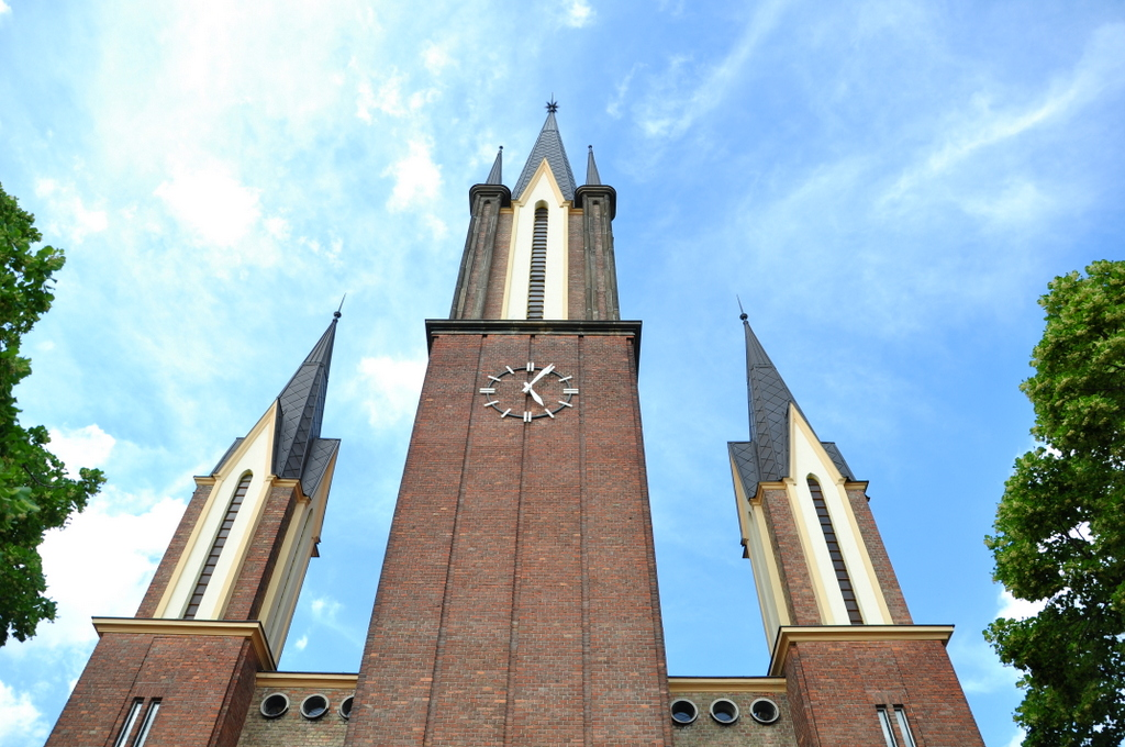 Rákospalota-óvárosi református templom